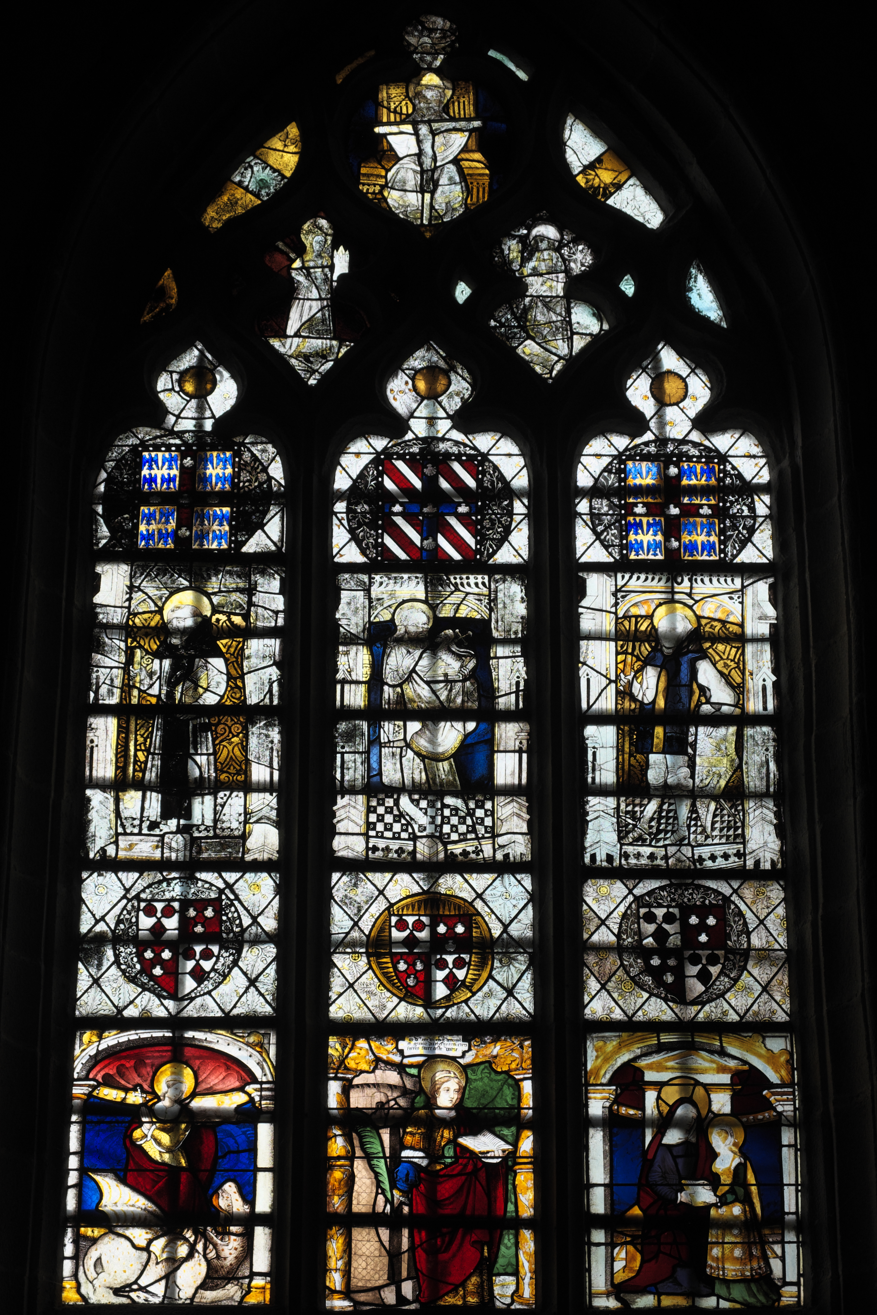 Katholische Pfarrkirche Saint-Ouen in Les Iffs im Département Ille-et-Vilaine (Region Bretagne/Frankreich), Bleiglasfenster (baie 5) aus dem 15. Jahrhundert und 1536; Darstellung: Heilige